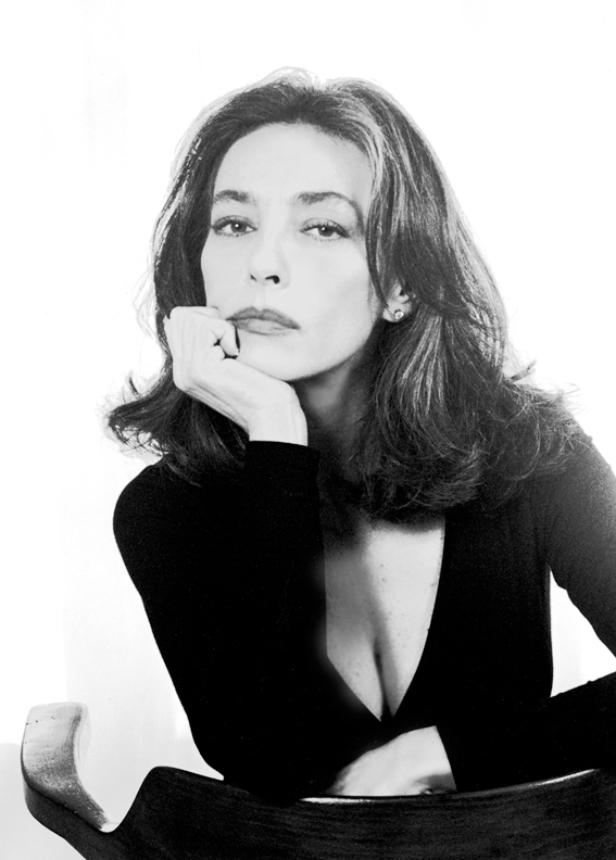 Maria Rosaria Omaggio. Attrice e scrittrice, vive a Roma. Per il suo impegno nel sociale è Goodwill Ambassador UNICEF